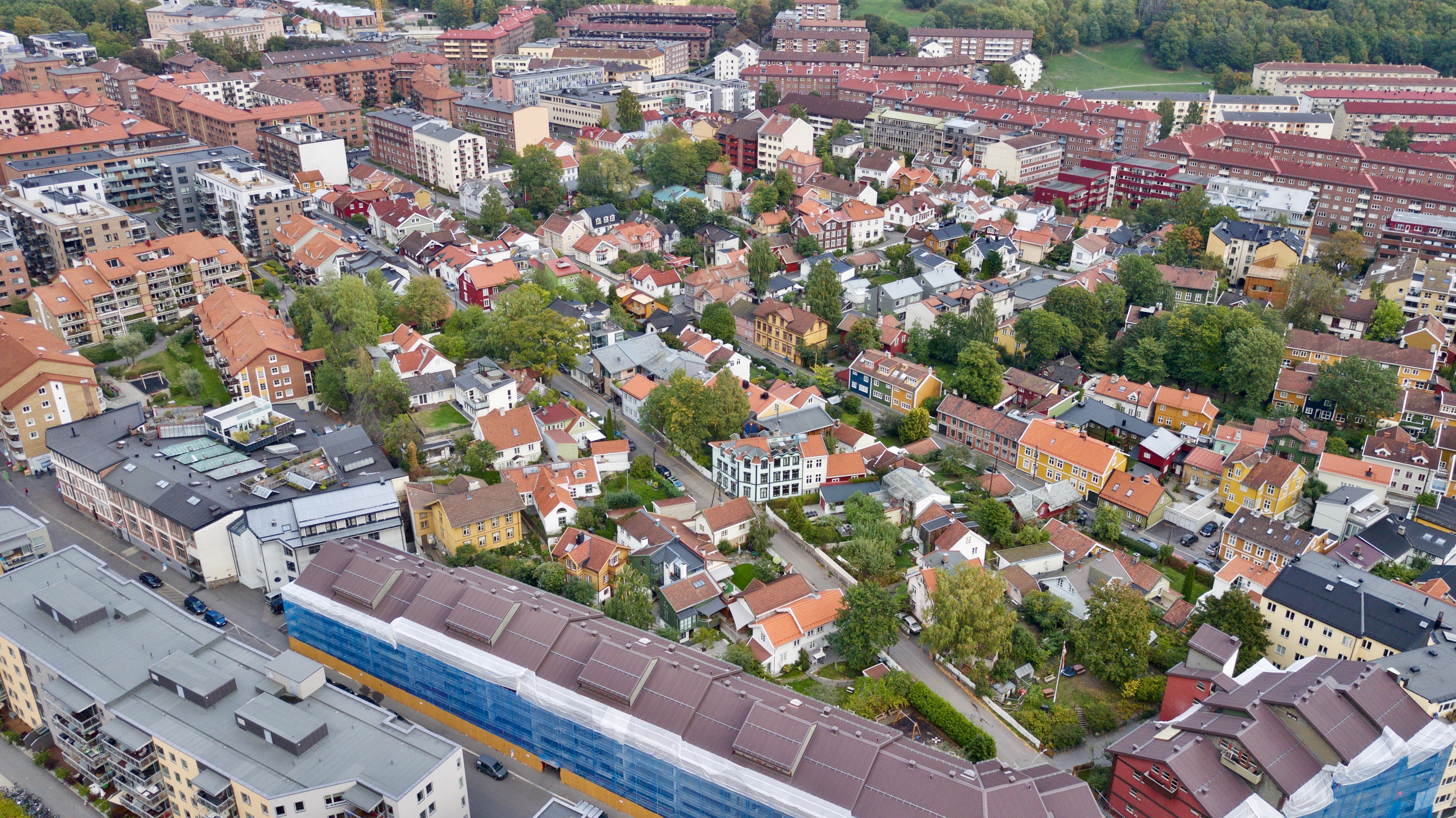 Rodeløkka i Oslo.